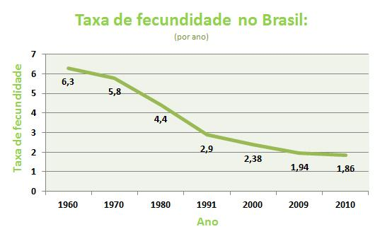 Gráfico mostrando a taxa de fecundidade brasileira entre 1960 e 2010.